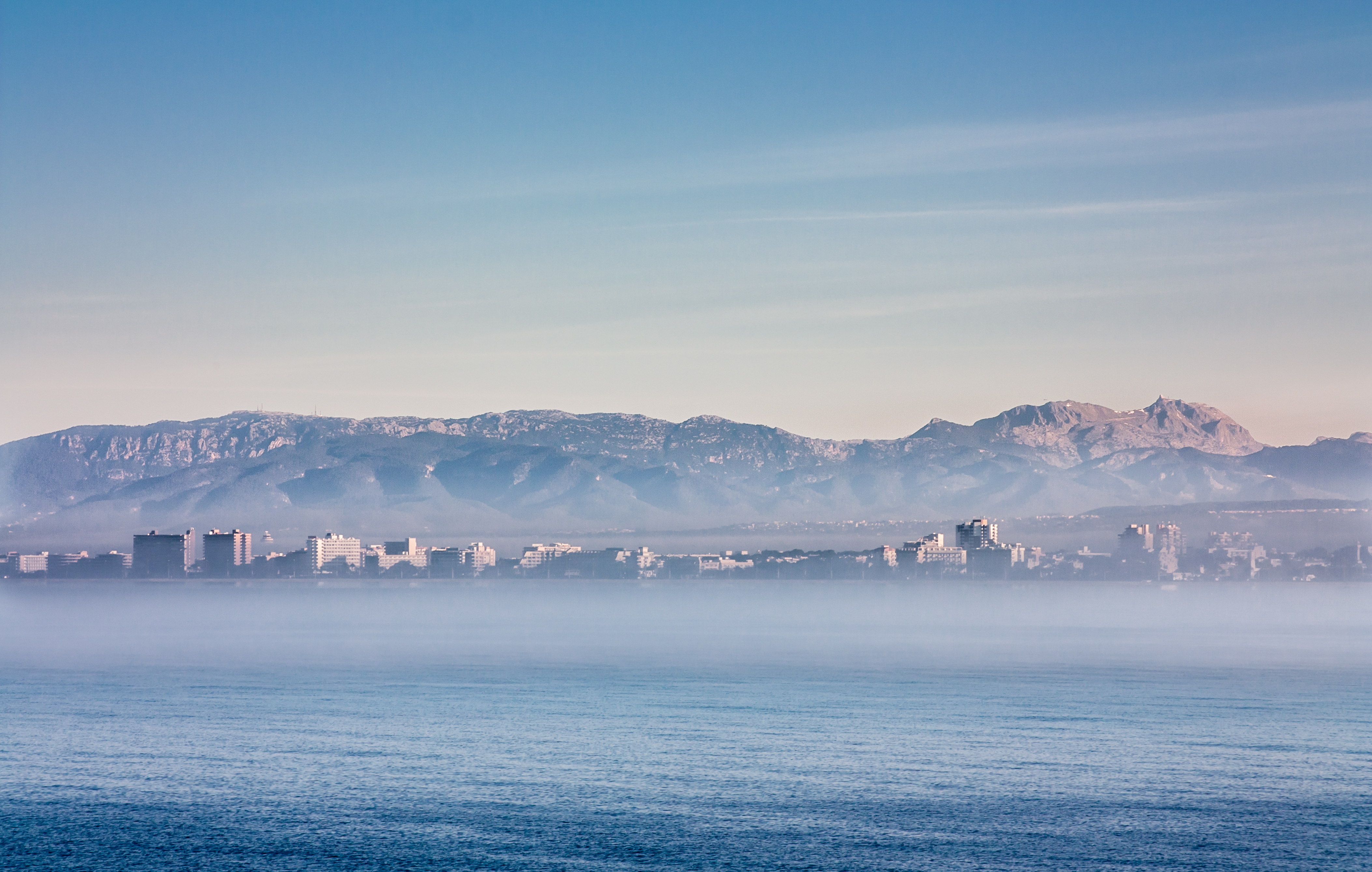 Esta mañana llevaba la cámara y no he podido evitar parar para inmortalizar como la niebla se comía Mallorca. He tenido que esperar a que se disipara un poco por que sinó, no tenía ninguna gracia, solo se veía niebla.. :D